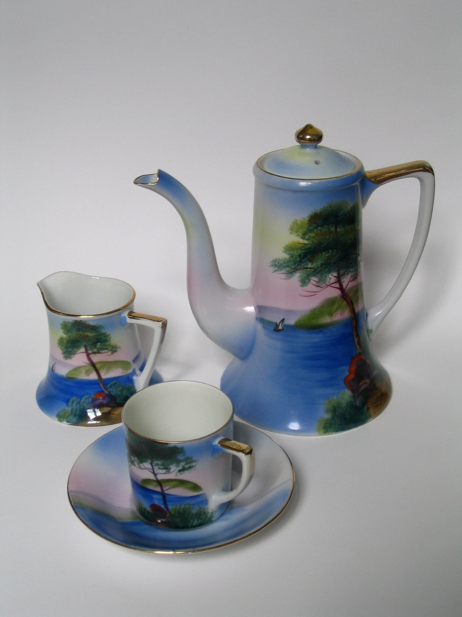 Service à café Noritake - vers 1920 auteur: P. Charpiat - 2006